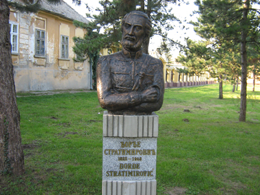 Bista Đorđa Stratimirovića- vojskovode od Jovana Soldatovića koje se nalazi u Kulpinu u Vojvodini